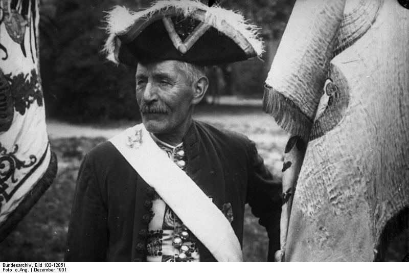 Die Halloren, eine Arbeitervereinigung aus historischen Zeiten, besuchen am Neujahrstage den Reichspräsidenten von Hindenburg und werden ihm eine historische Gabe mit einer Ansprache überreichen. Die Halloren statteten vor dem Kriege regelmässig, zu letzten Male am 1. Januar 1914, dem Berliner Hof einen Neujahrsbesuch ab. Vom 1. Januar 1932 wollen sie ihe Neujahrsbesuche wieder aufnehmen. Der älteste der Halloren Moritz in seiner historischen Tracht, welcher durch sein Fahnenschwenken an der Spitze der Hallorenzüge berühmt geworden ist.